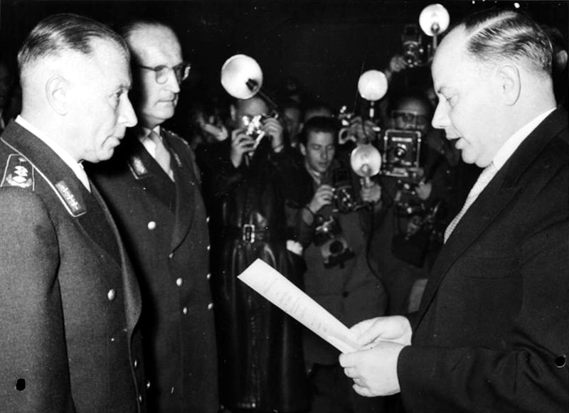 This description has been identified as biased or incorrect: GDR propaganda languageADN-Zentralbild 15.11.1955 Erste Generale ernannt Die Angst vor einer Minderung der internatiolen Spannung und das Beharren der Westmächte auf dem NATO-Standpunkt sind die Triebfeder für die Bonner Revanchepolitik zu einer beschleunigten Remilitarisierung. Sie fordern momentan, den Kalten Krieg zu erneuern und in schärferen Formen durchzuführen, um ihn eines Tages in einen heissen verwandeln zu können. Die ersten 101 Kader erhielten am 12.11.1955 durch Kriegsminister Theodor Blank die Ernennungsurkunden für die neue Wehrmacht. An der Spitze stehen die faschistischen Generale Heusinger und Speidel. UBz: Blank überreicht die Urkunden an Heusinger (vorn) und Speidel (daneben).